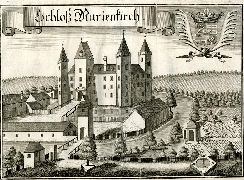 “Schloß Marienkirch” (Wasserschloss Mariakirchen, Arnstorf), aus: Beschreibung des Churfürsten- und Hertzogthumbs Ober- und Nidern Bayrn. – Rentamt Landshut, Gericht Pfarrkirchen, 1723